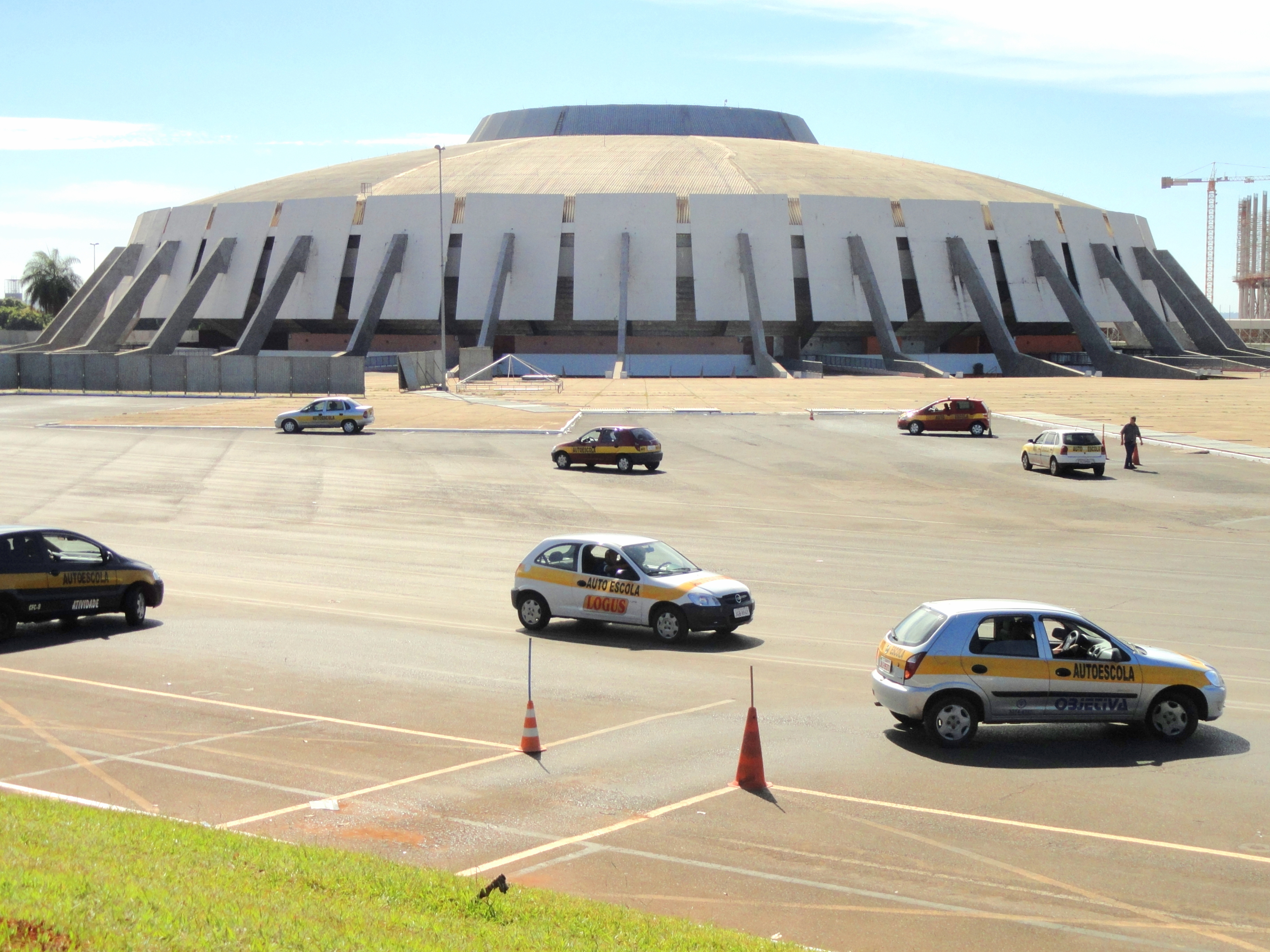 Ginásio Nilson Nelson, Brasília, Brazil.